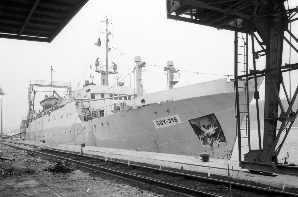 im Nordhafen. Ein Besatzungsmitglied hat in Deutschland Asyl beantragt.